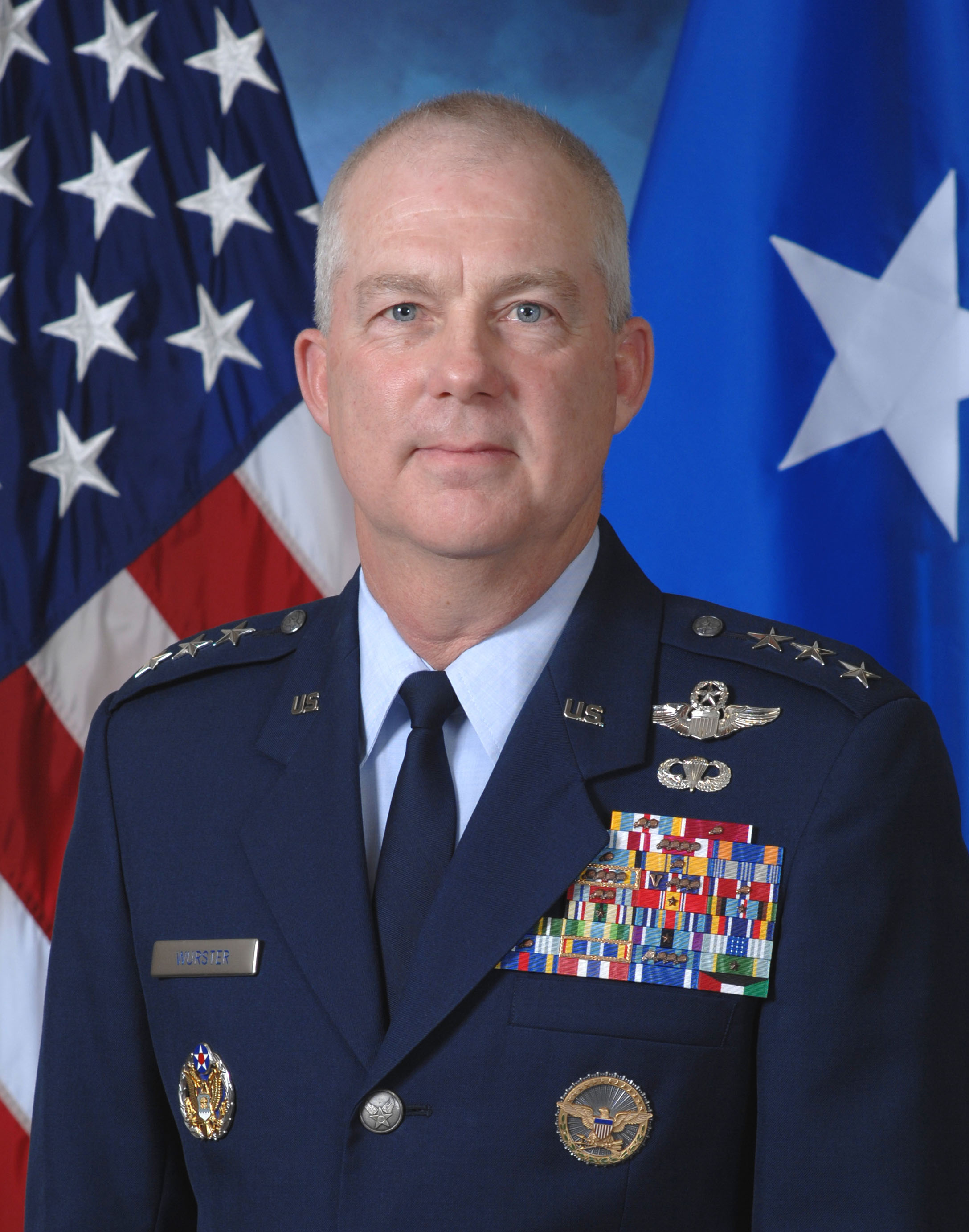 Lieutenant General Donald C. Wurster, Kommandierender General des AFSOC